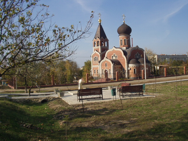 г.Темрюк. Храм Архангела Михаила.